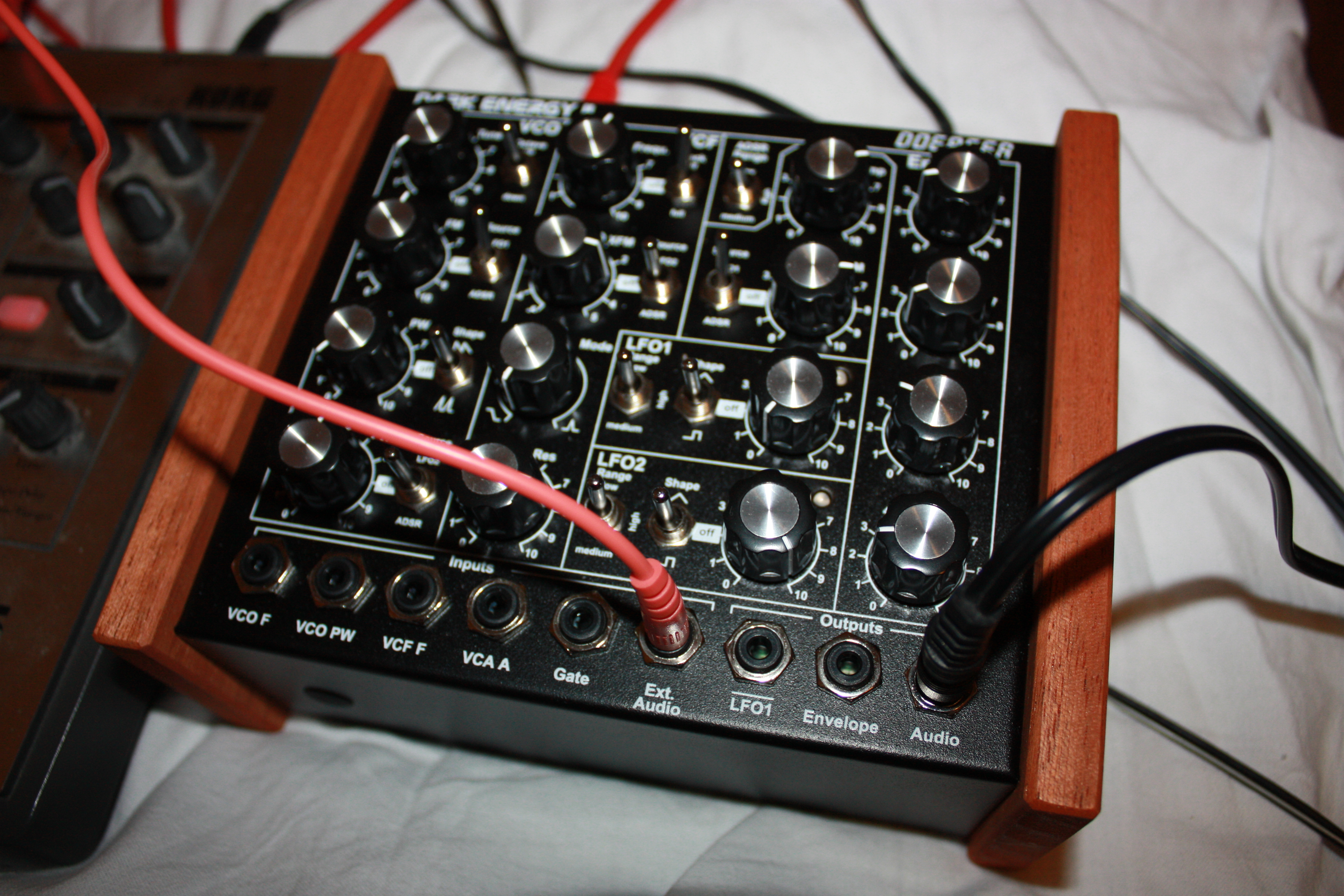 Tags: analog german synth doepfer sebilden vision:text=0557 vision:outdoor=0889